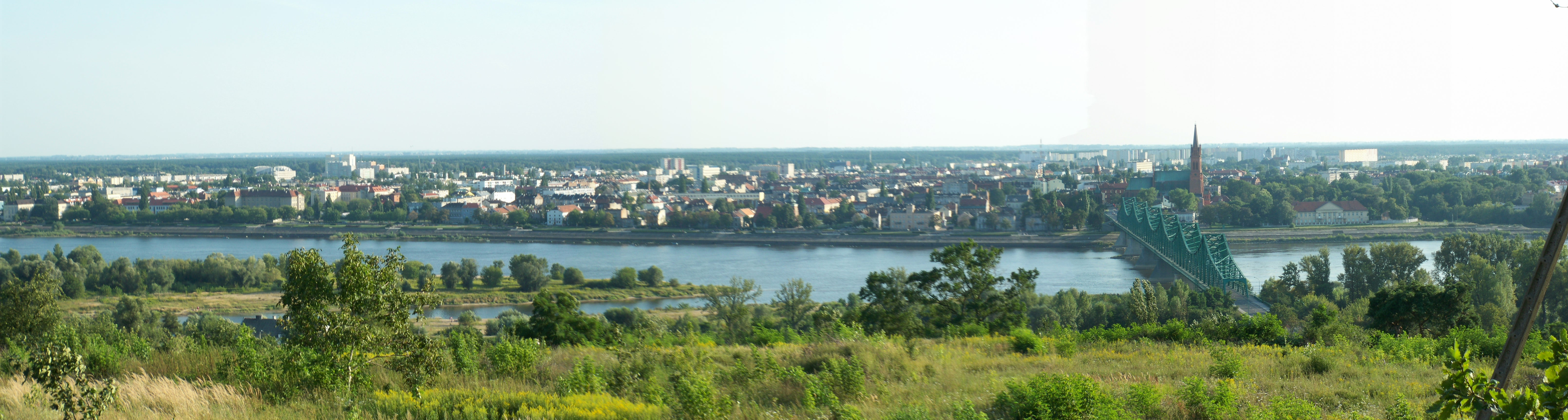 Widok ze Wzgórz Szpetalskich (2009 r.)